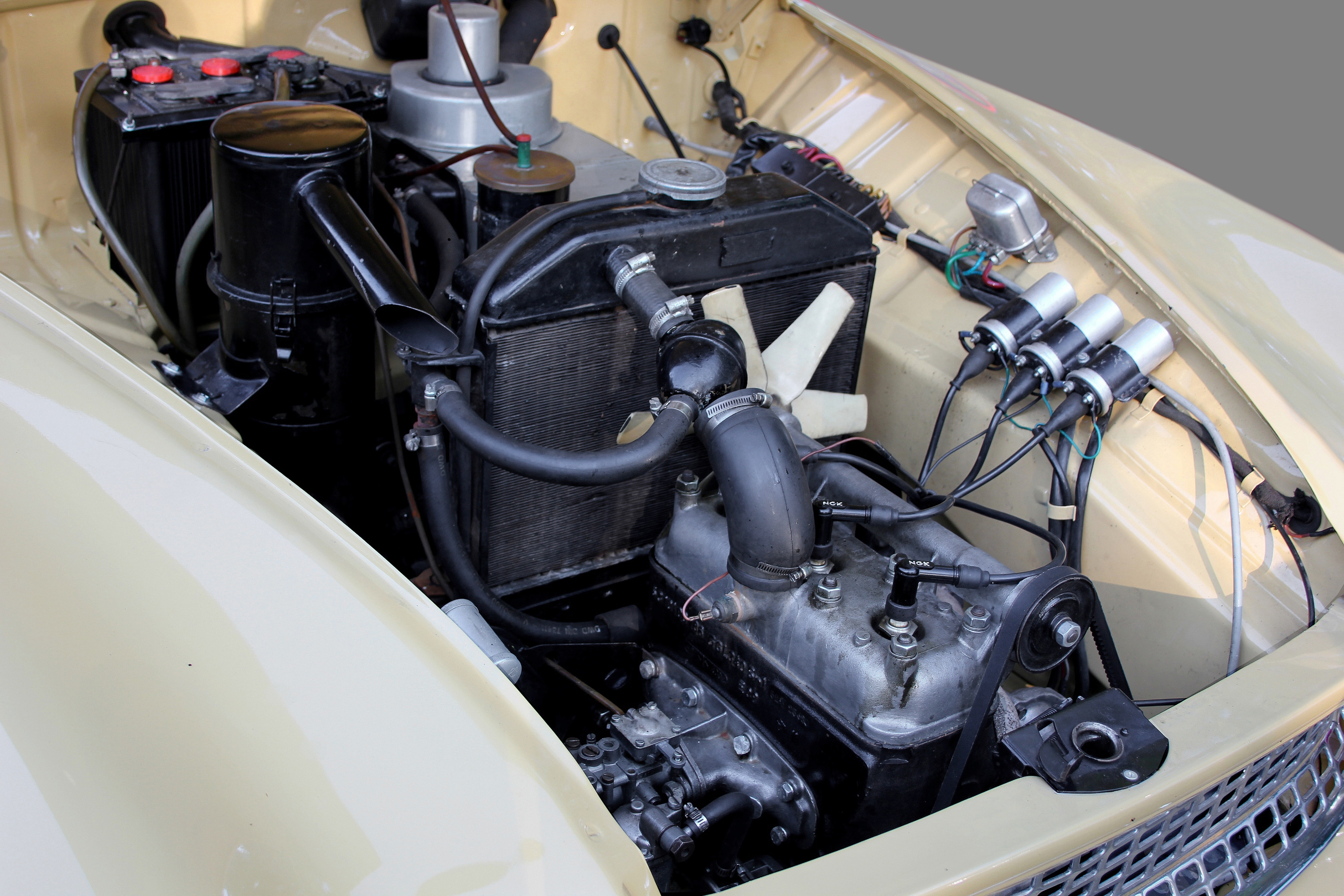 Wartburg 1000, Typ 311-108, Baujahr 1963, bei der Food Rallye in Neuwied. 3-Zylinder-Zweitaktmotor, 992 cm³, Bohrung 73,5 mm, Hub 78 mm, Verdichtung 1 : 7,4, Leistung 45 PS bei 4250/min